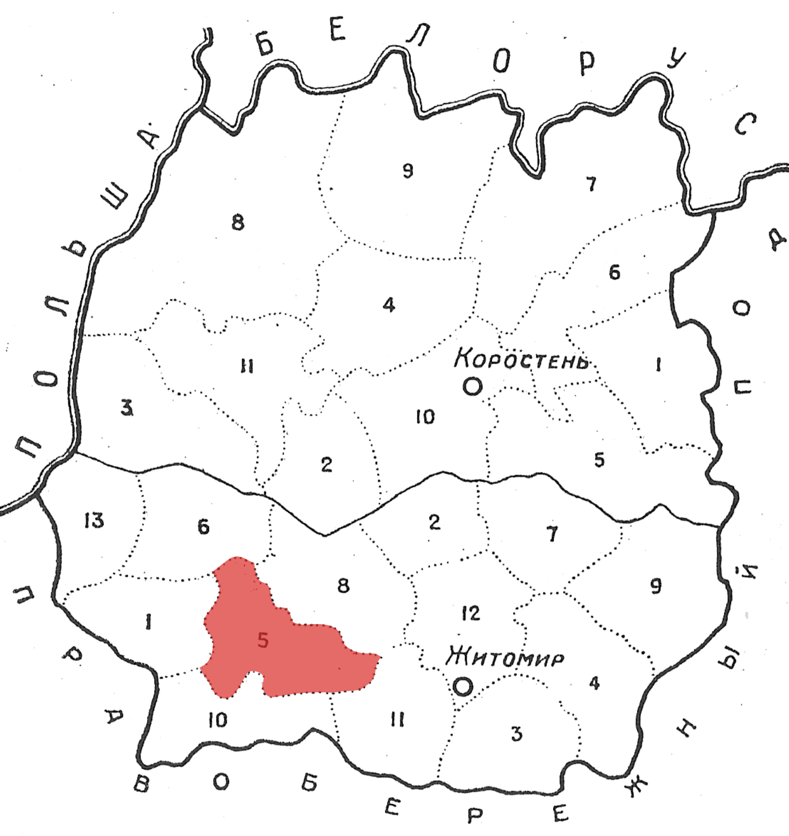 Polski Rejon Narodowy im. Juliana Marchlewskiego w 1927 roku